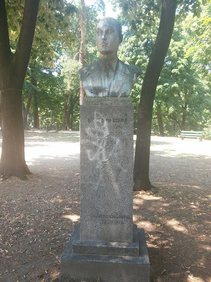 Биста Владе Ђорђевића у Лесковцу